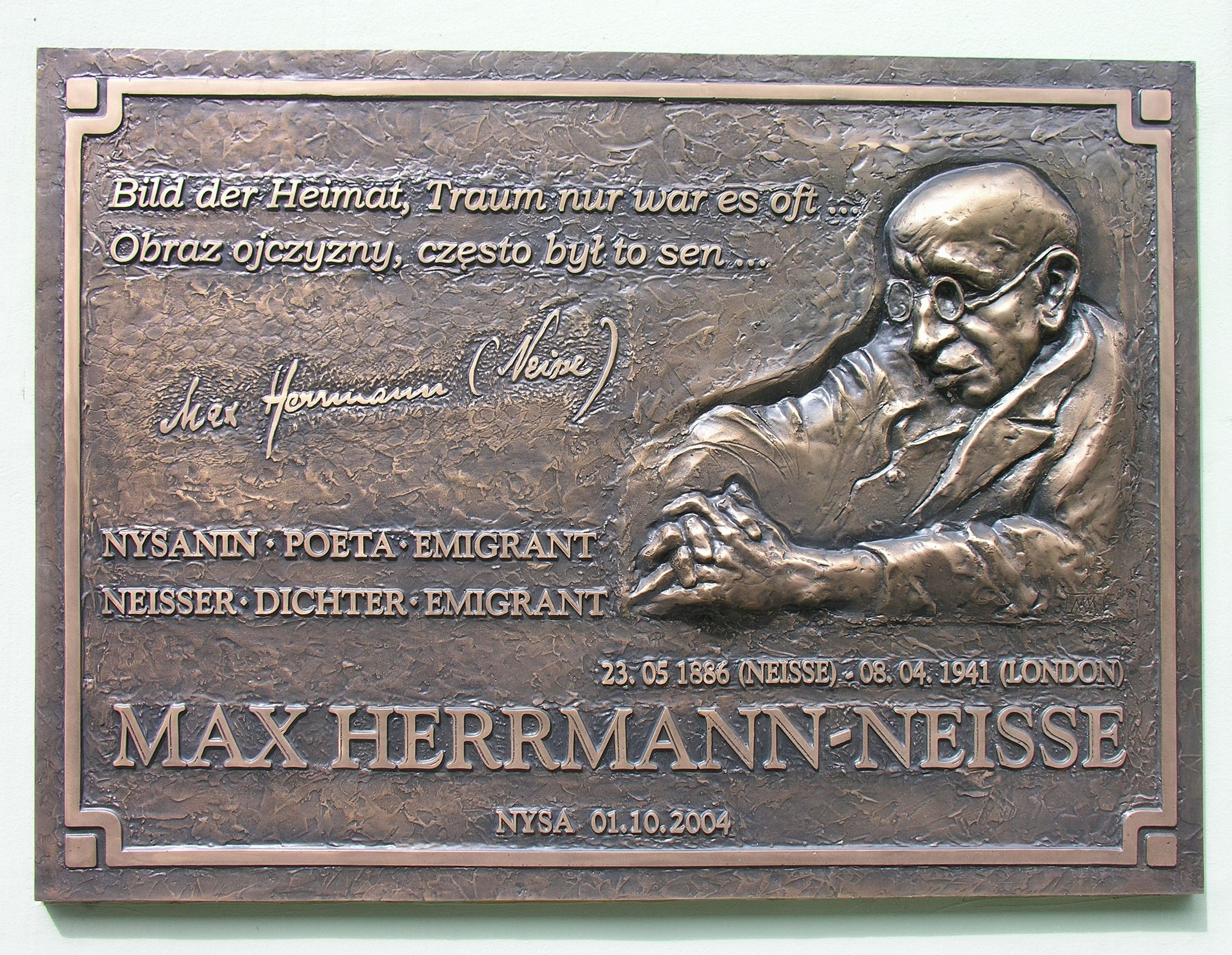 Tablica ku Czci Maxa Herrmanna-Neisse w Nysie